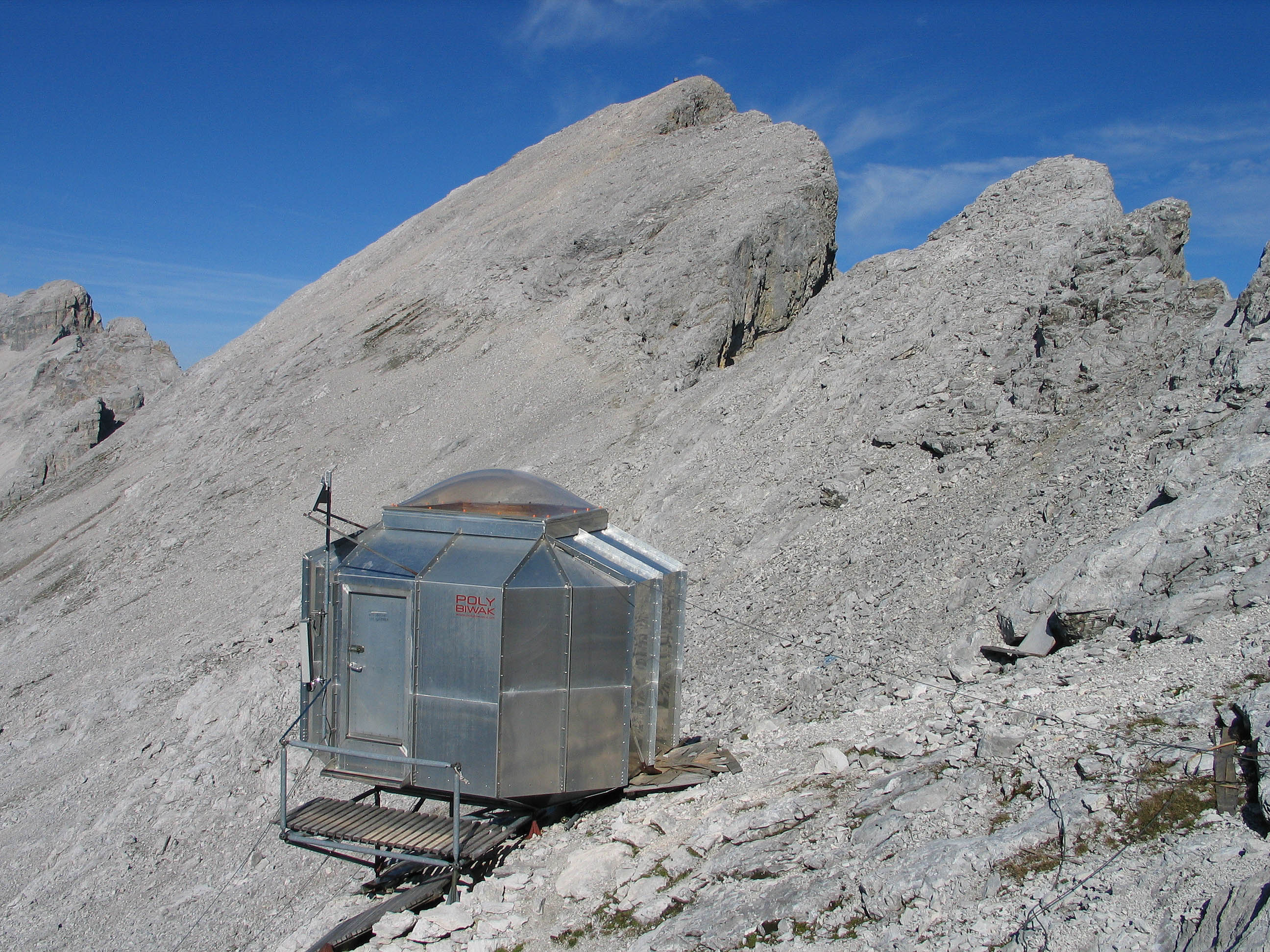 Laliderer Spitze, Karwendel Photograph: Luidger (10. September 2006)